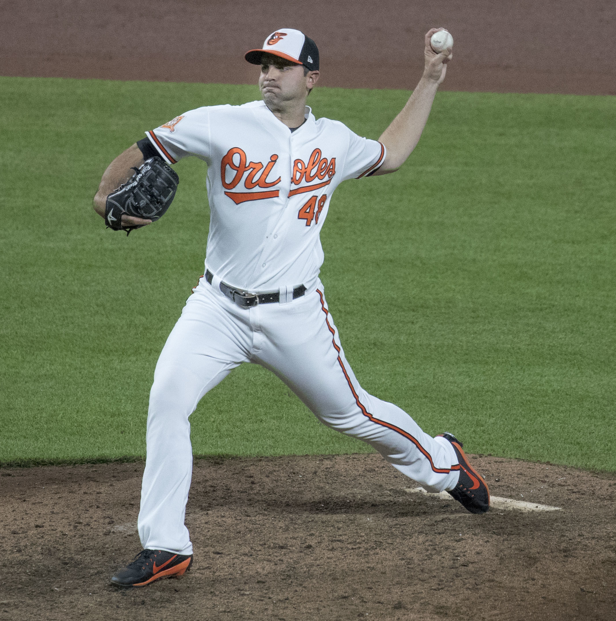 Pirates at Orioles 6/7/17